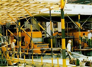 מערכת שאיבה סטטית. התמונה באדיבות Putzmeister . את האישור ניתן למצוא כאן.